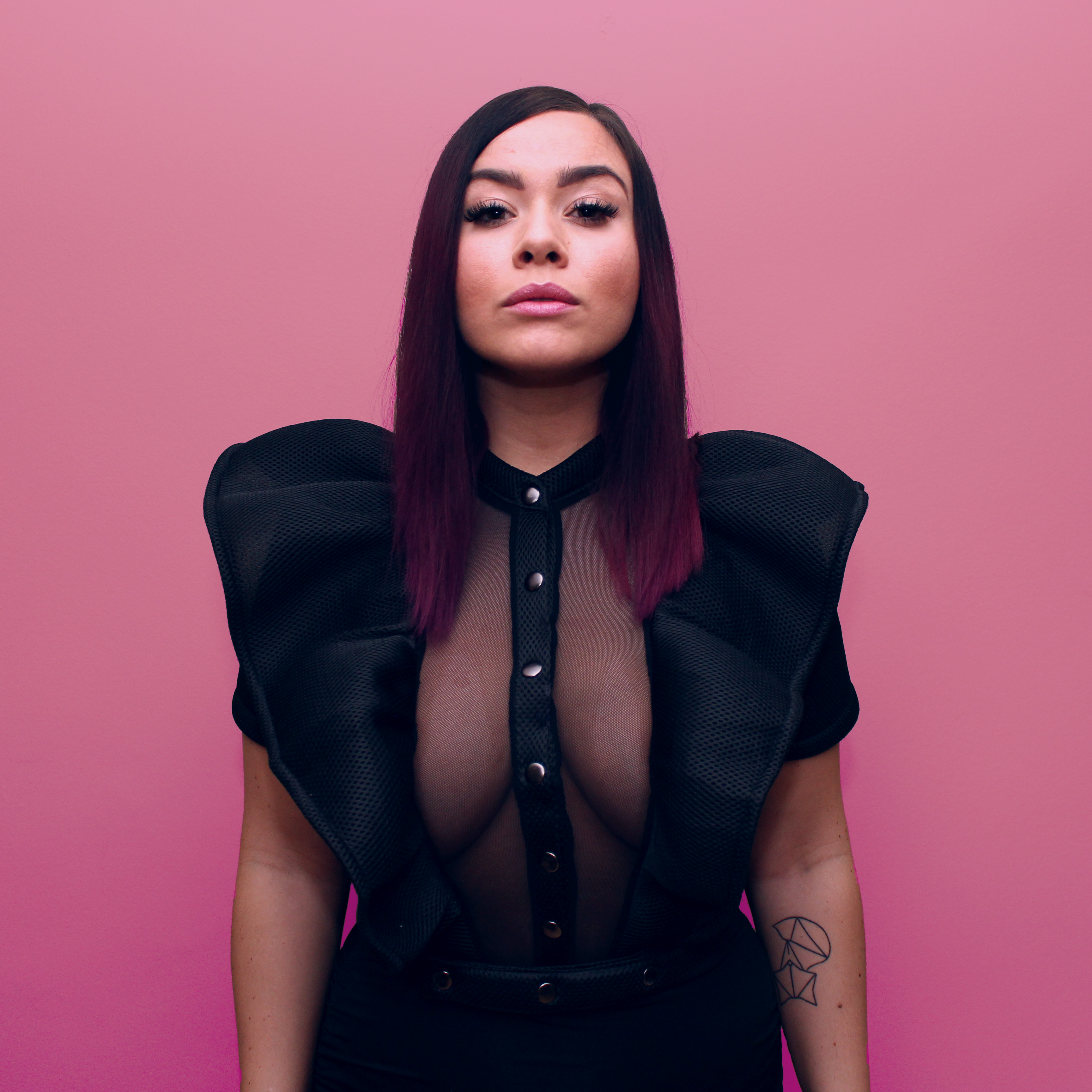 Pressbild Ester Fox